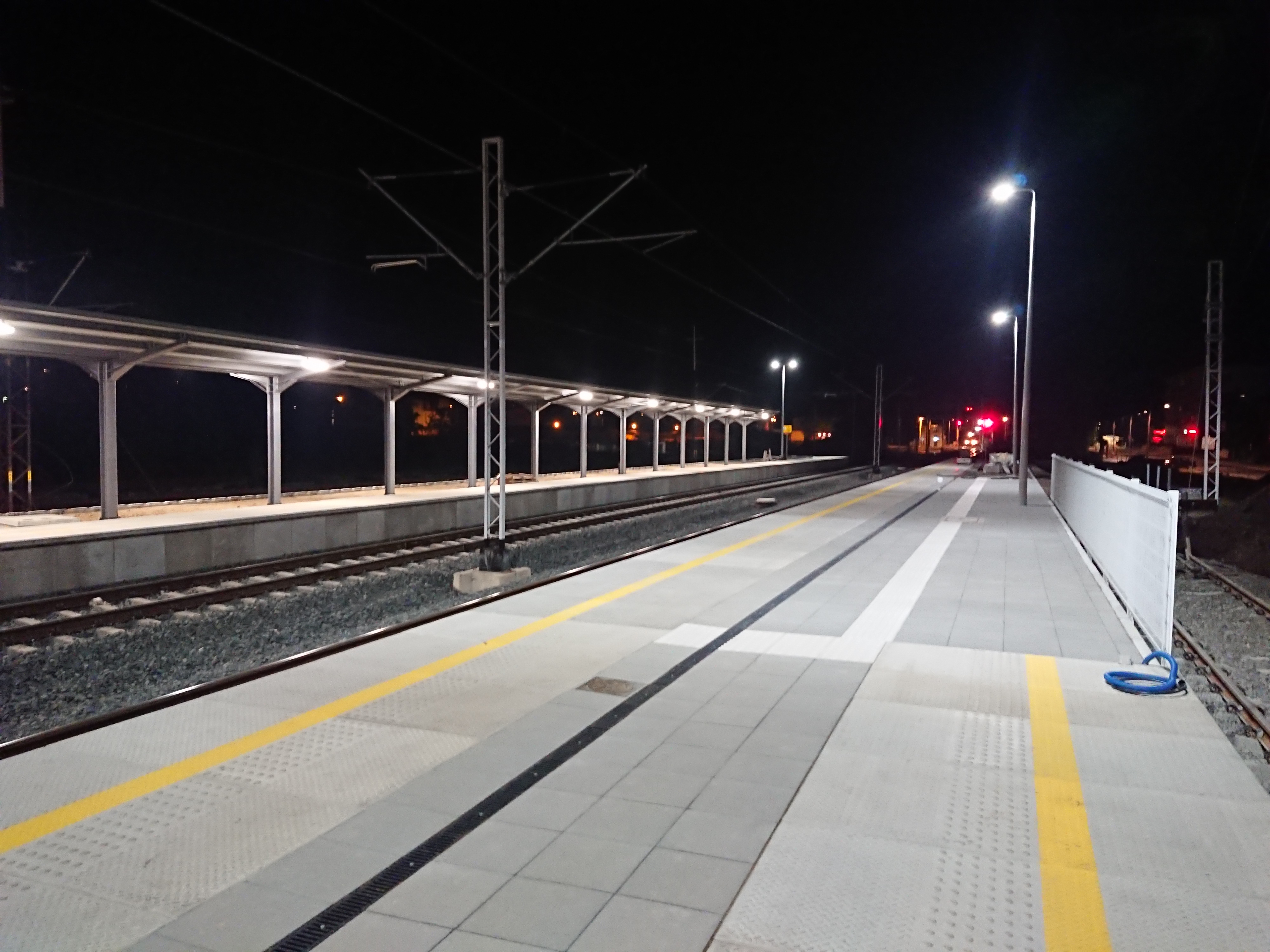 Widok na peron 1 i 2